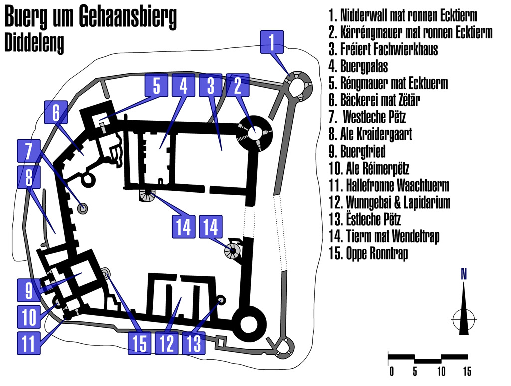 Plang vun der Buerg um Gehaansbierg zu Diddeleng: Ze Bemierken ass, datt d'Gréissten an d'Wenkelen net 100% stëmmen, well d'Zeechnung sech u selwergemaache Fotoen, Loftopnahmen an offiziellen Donneeën aus Broschüren orientéiert. Dëst Bild weist déi momentan Situatioun vun den Ausgruewungen. Kategorie:Gemeng Diddeleng Kategorie:Gemeng Keel Kategorie:Buergen a Schlässer zu Lëtzebuerg Kategorie:Archeologesch Plazen zu Lëtzebuerg